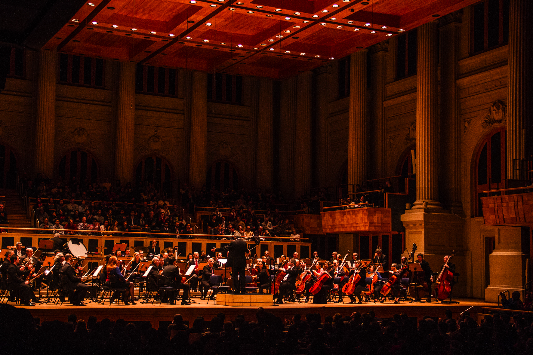 Concerto da Série Fronteiras na Sala São Paulo